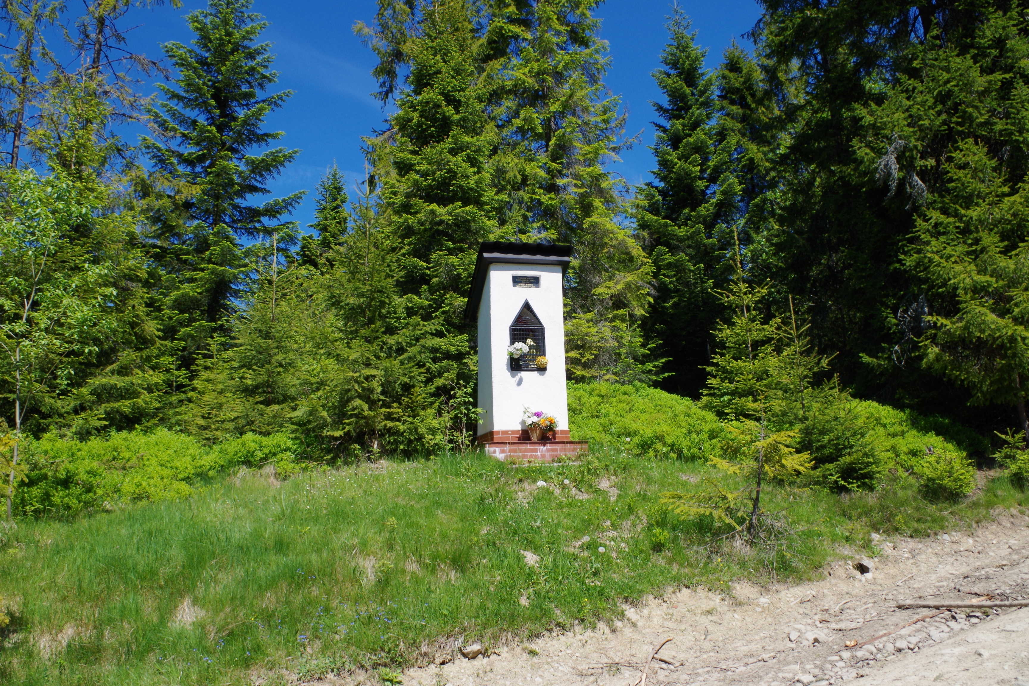 Polana Łapsowa Wyżna na grzbiecie Bukowiny Obidowskiej